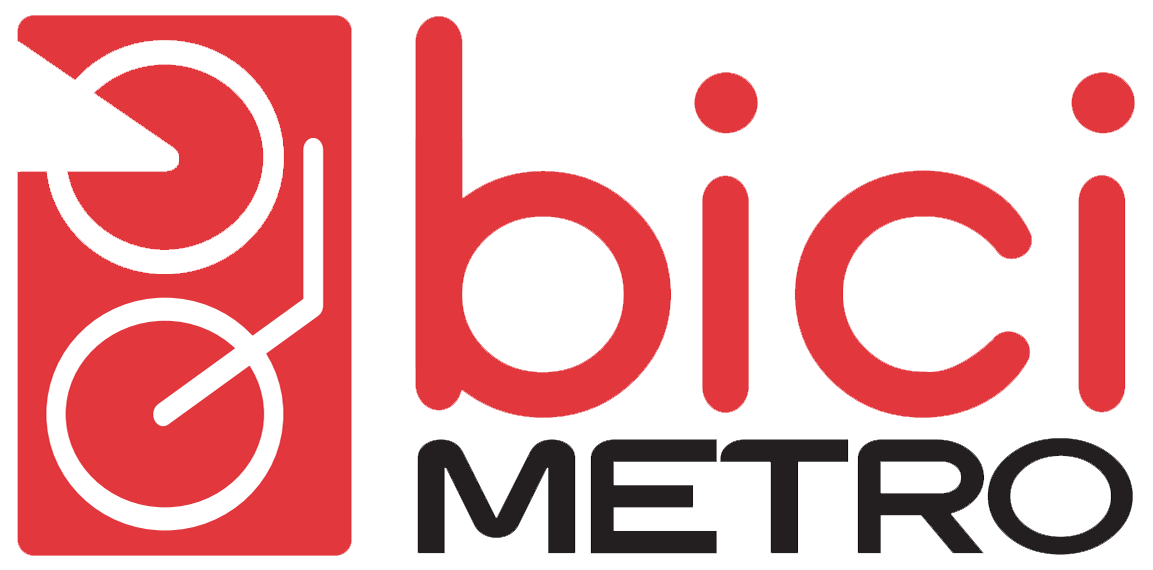 Emblema de Bicimetro